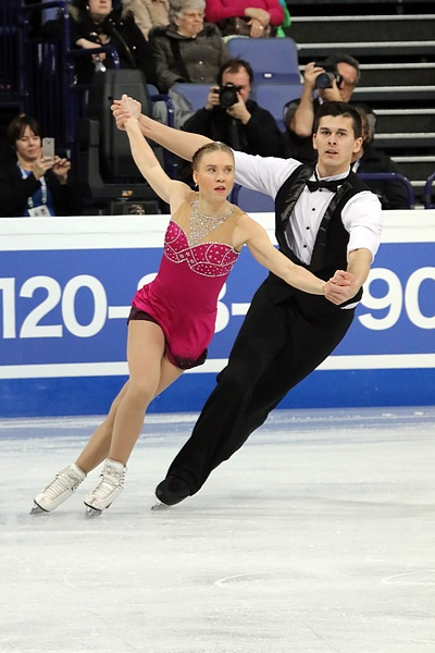 Эмилия Симонен / Маттеу Пенассе (Финляндия) на чемпионате мира 2017